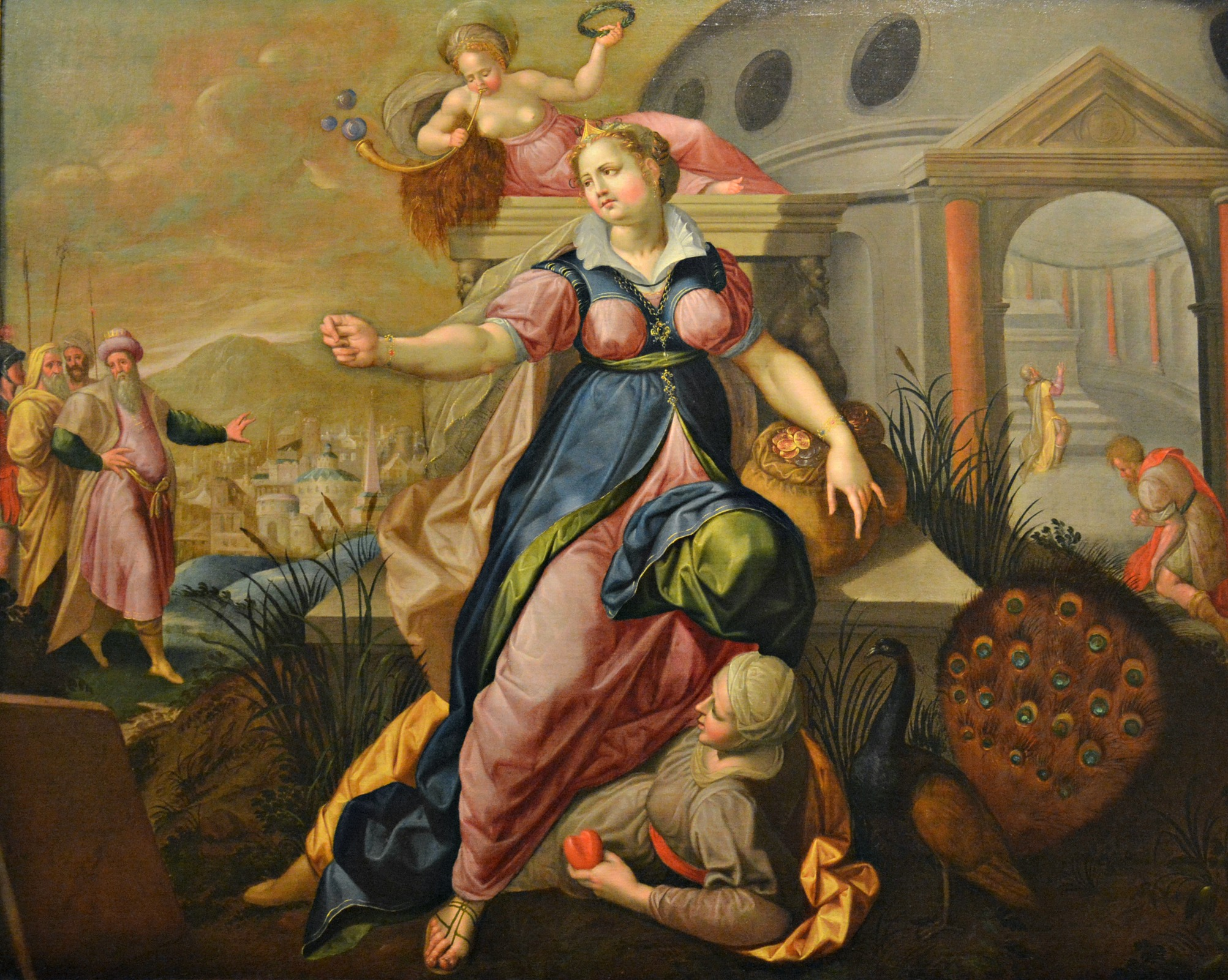 Vedi titolo